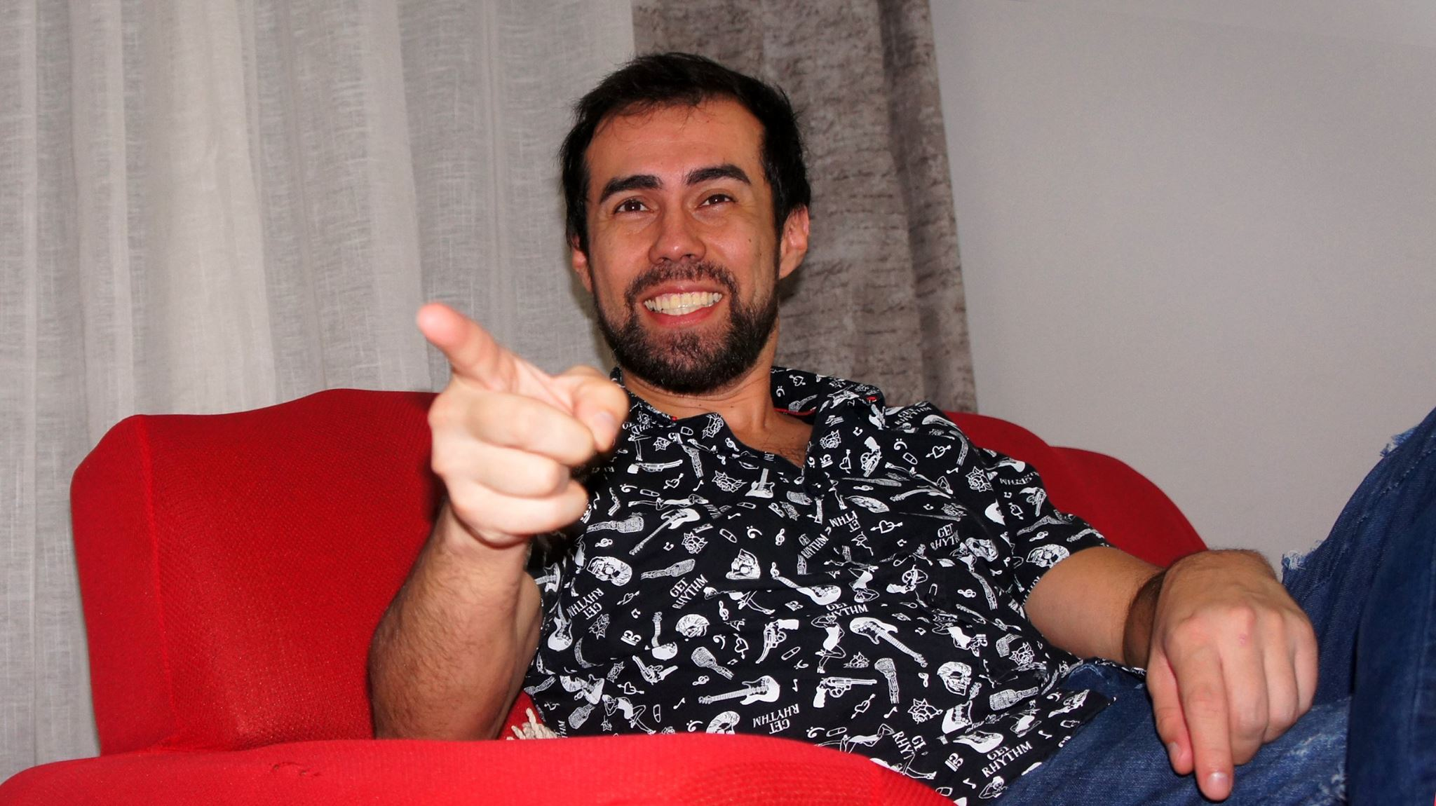 Nando Schweitzer - Director Teatral en entrevista al portal Sincerando